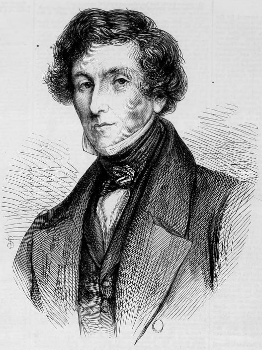 Richard Green